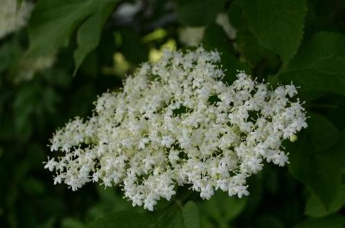 Sambucus nigra